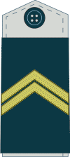 Serbian military ranks and insignia